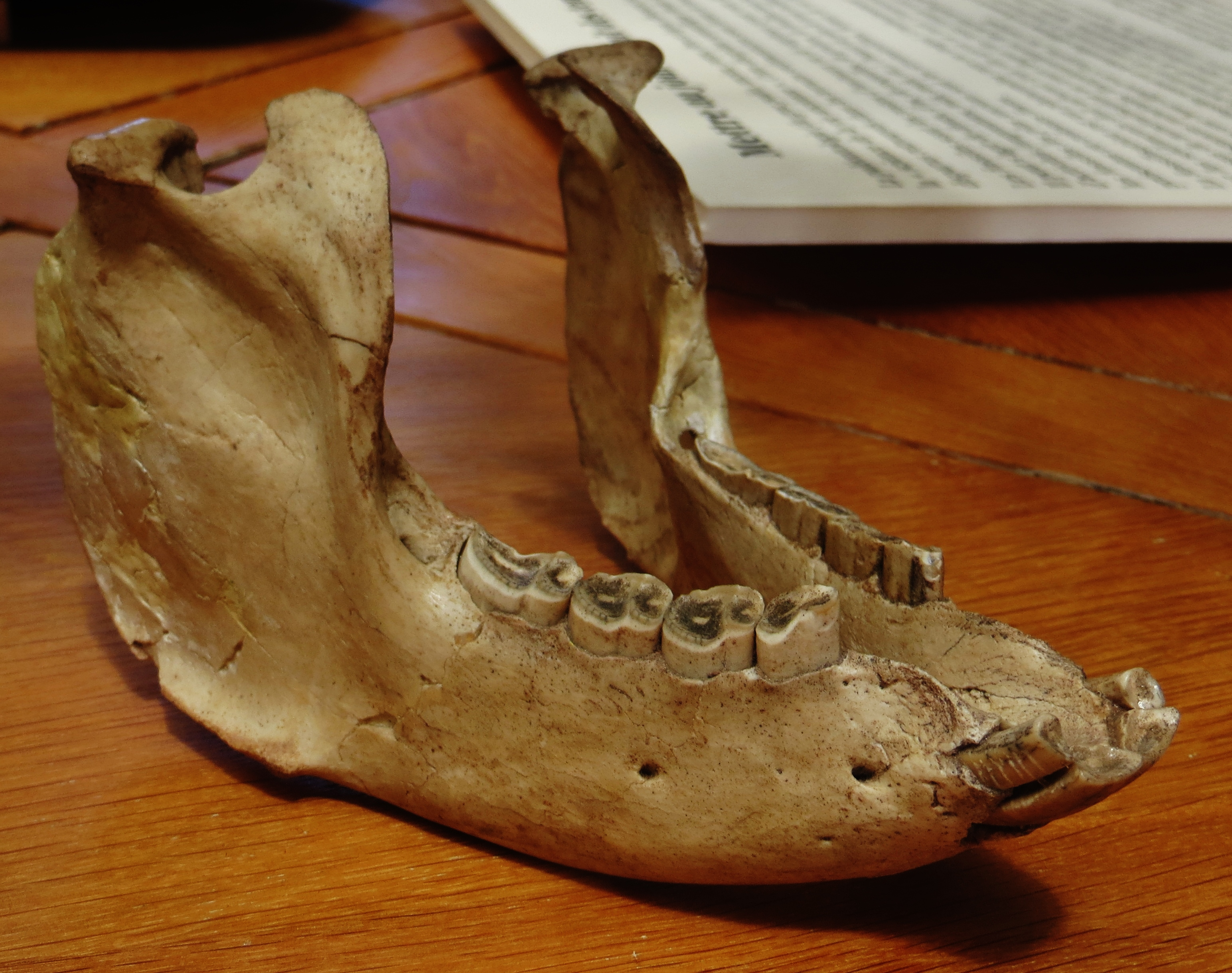 Plesiotypotherium fossil